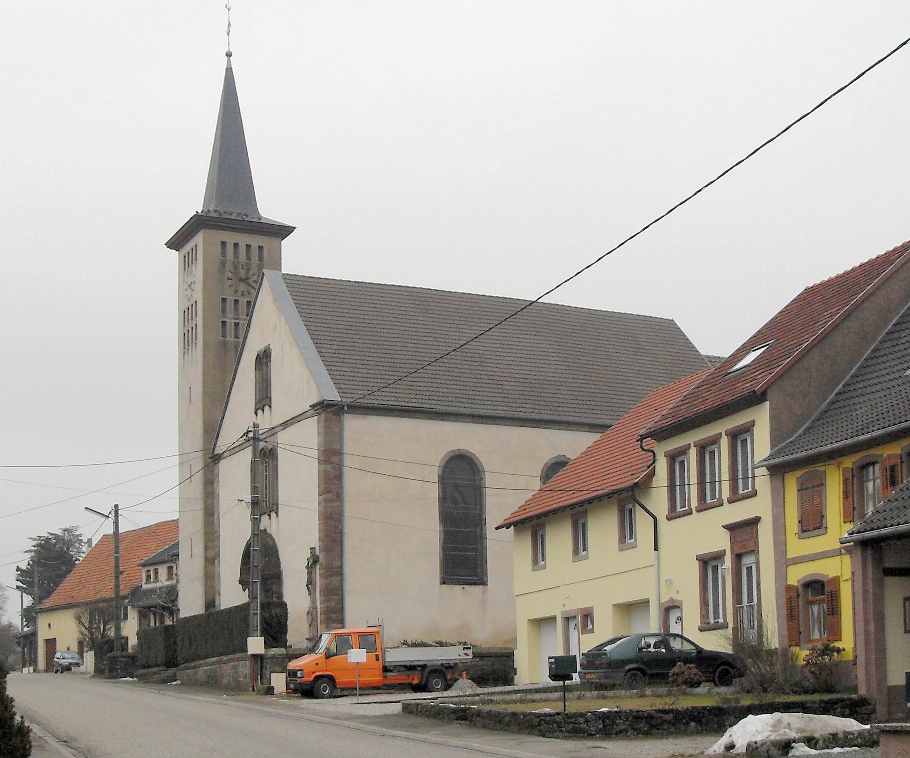 L'église Sainte Dorothée à Siewiller